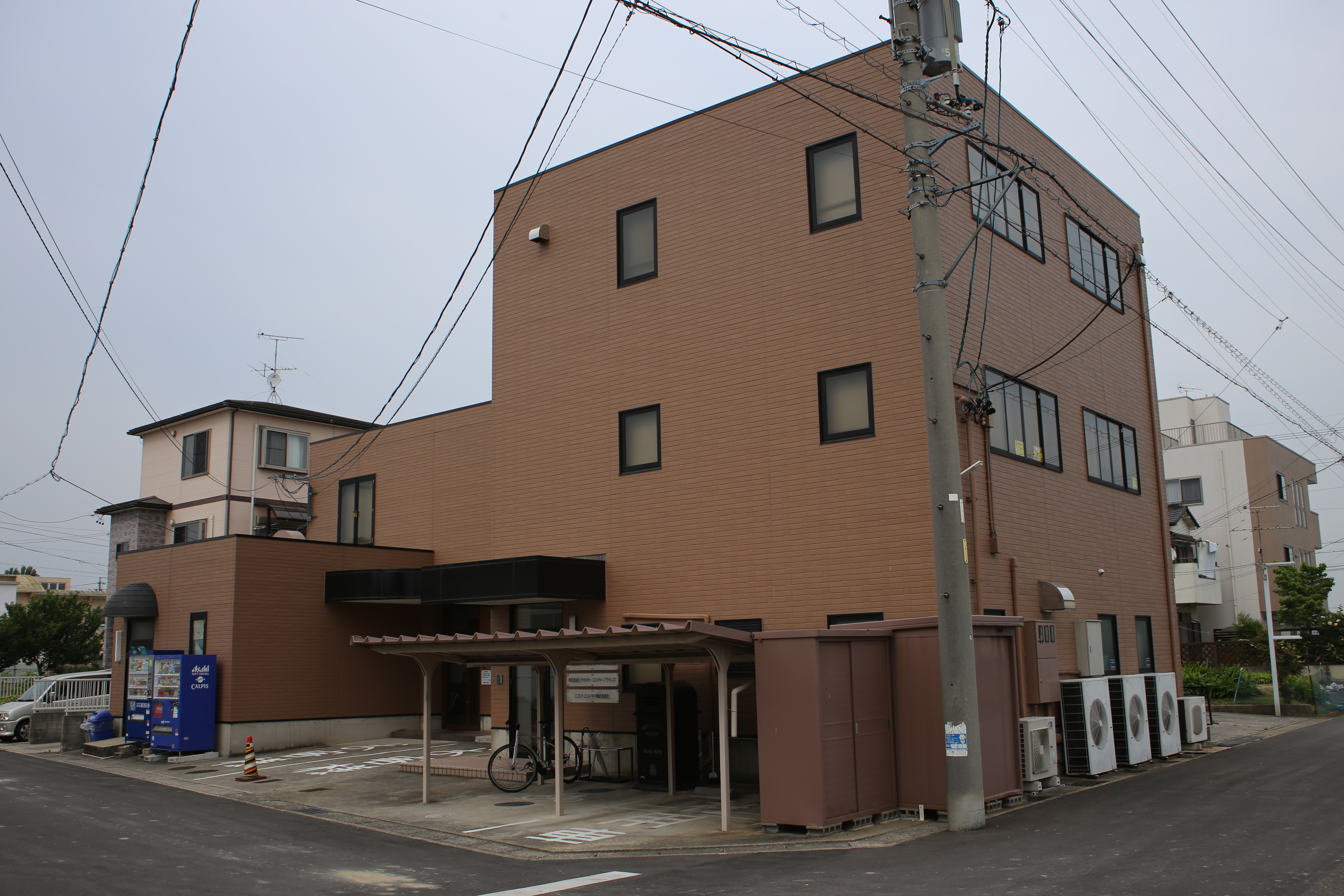 愛知県北名古屋市沖村山ノ神のチタカ・インターナショナル・フーズ本社を南側公道西側より撮影